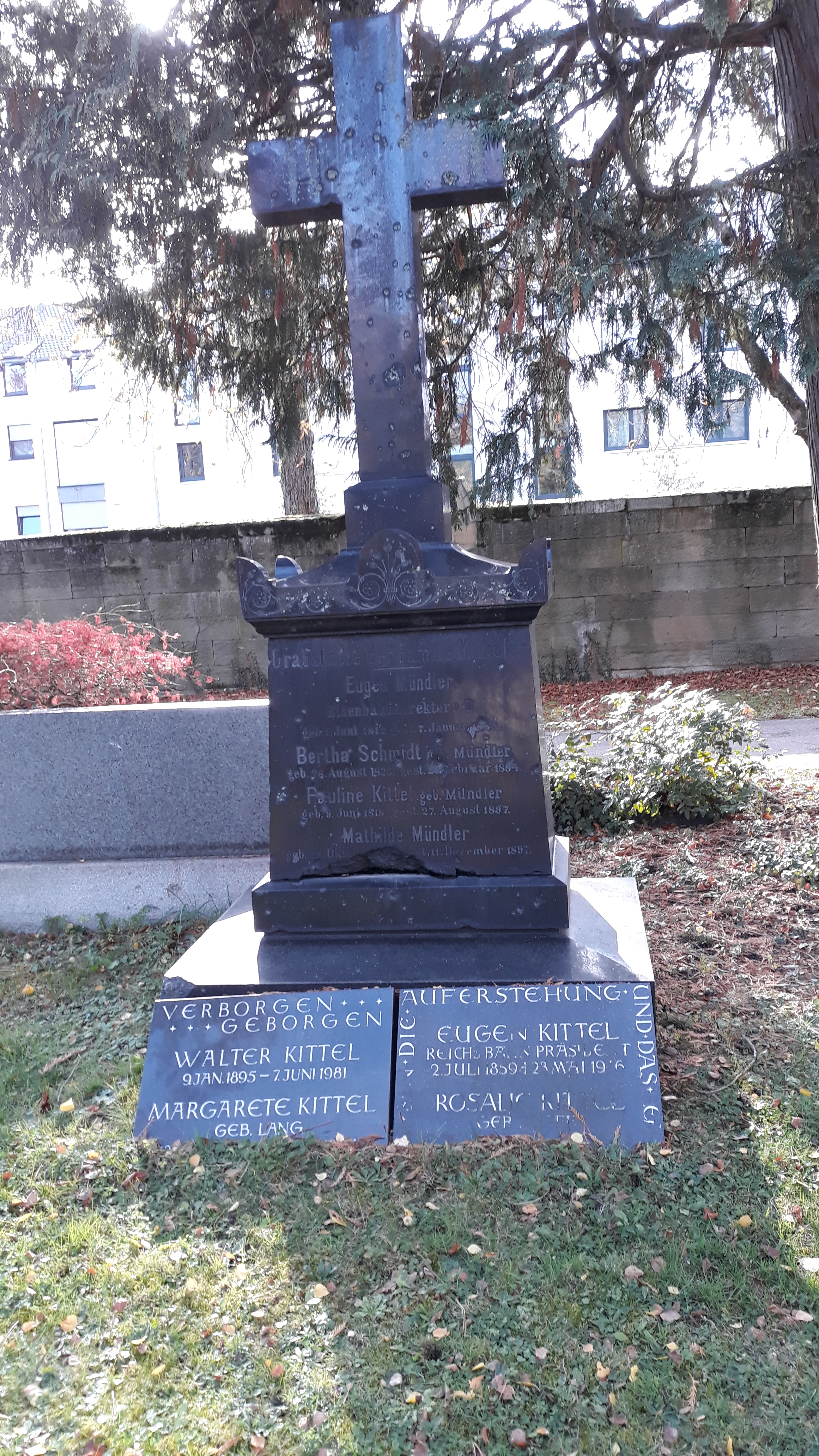 Das Grab des deutschen Eisenbahningenieurs Eugen Kittel und seiner Ehefrau Rosalie auf dem Pragfriedhof Stuttgart.